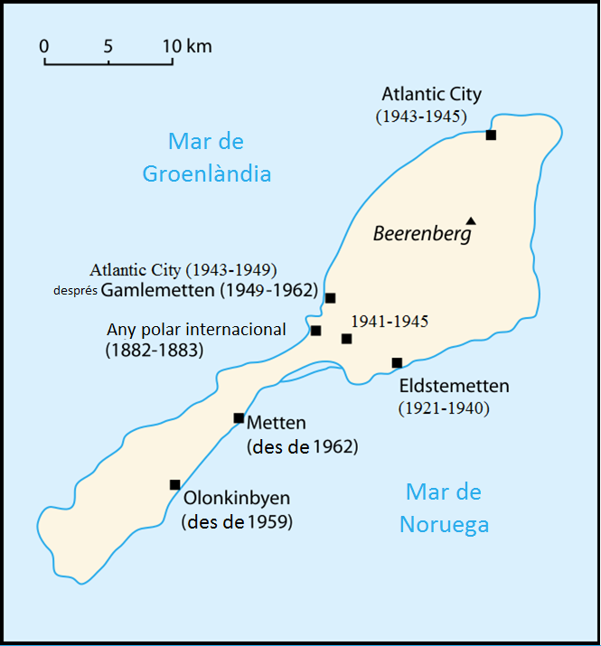 Mapa de l'illa de Jan Mayen (Noruega) en català, indicant les diferents estacions.